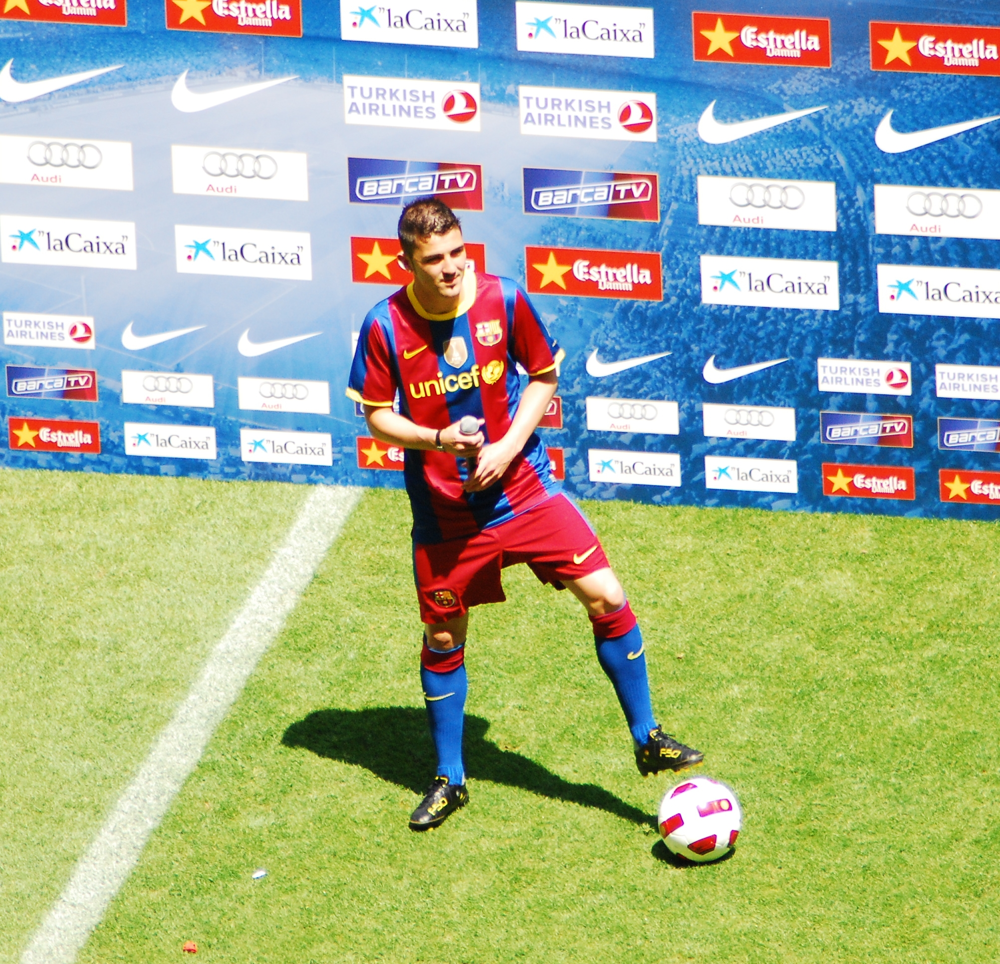 Presentación de David Villa como jugador del FC Barcelona.